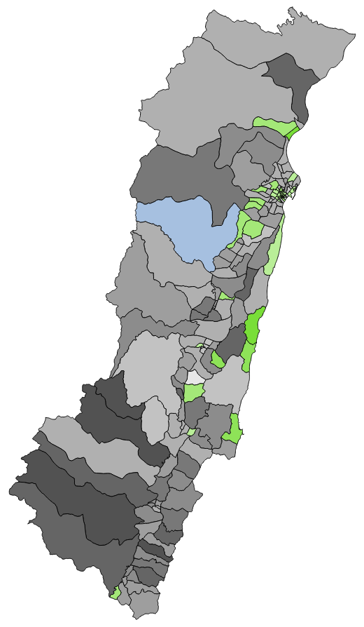 中文（台灣）: 顏色對照表 部分村里因共用投開票所 故圖中部分村里得票為依人口調整後資料